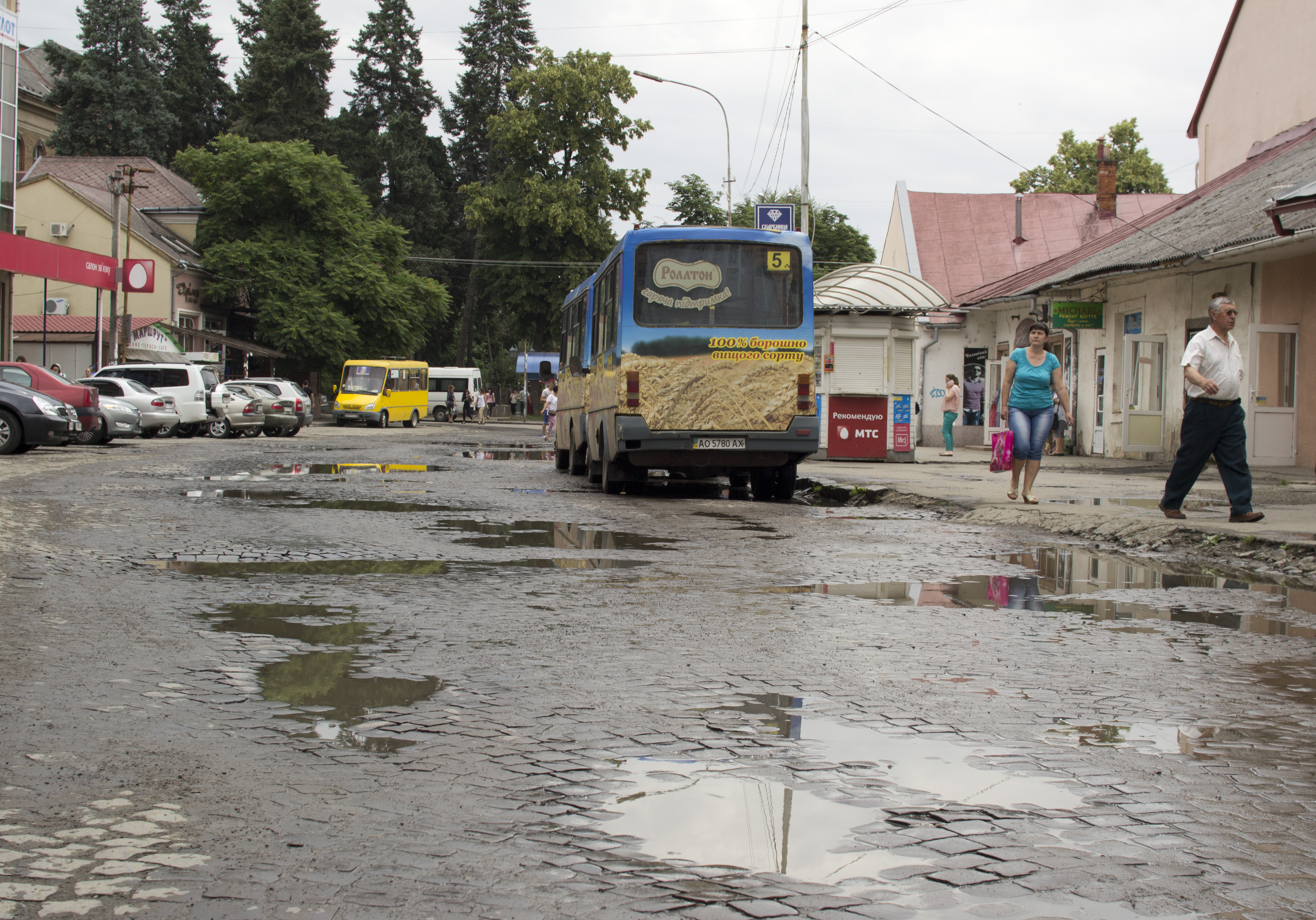 Koriatovycho náměstí, obratiště linky 5, Užhorod, Ukrajina